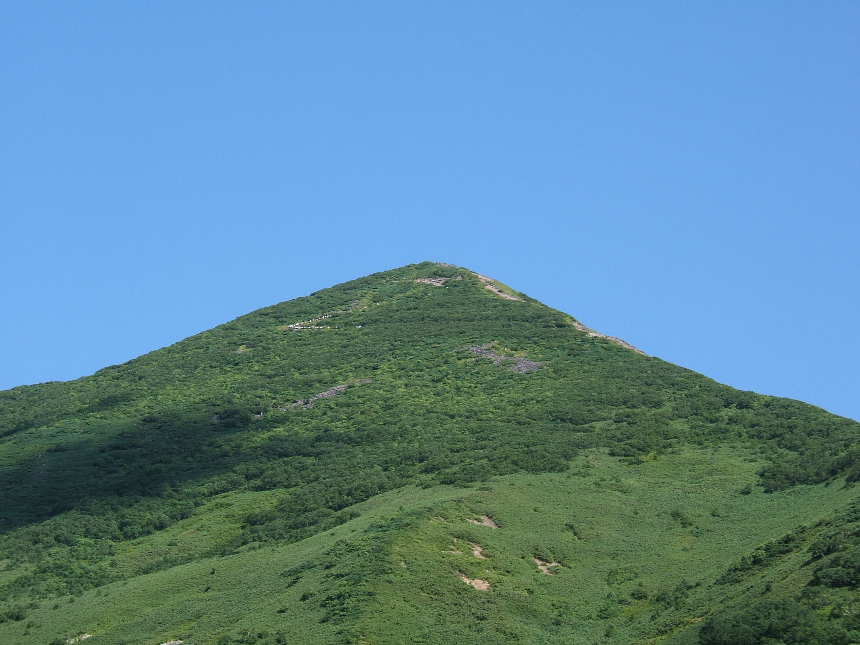 Niseko Annupuri (in Summer). Hokkaido, Japan